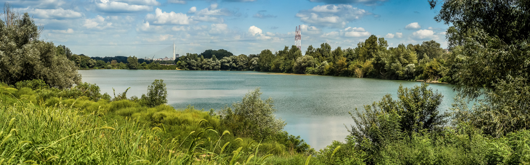 Akumulaciono jezero kraj Ade Ciganlije